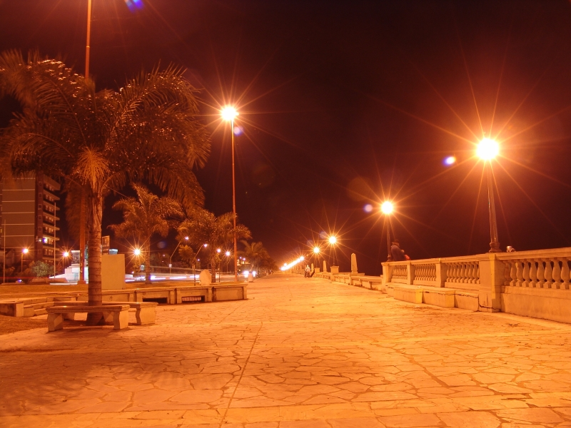 Costanera de Santa Fe, Argentina